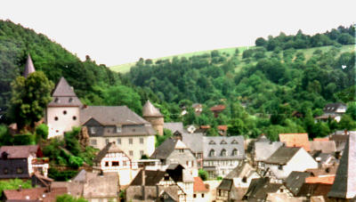 Ortsansicht von Herrstein, selbst fotografiert, gemeinfrei